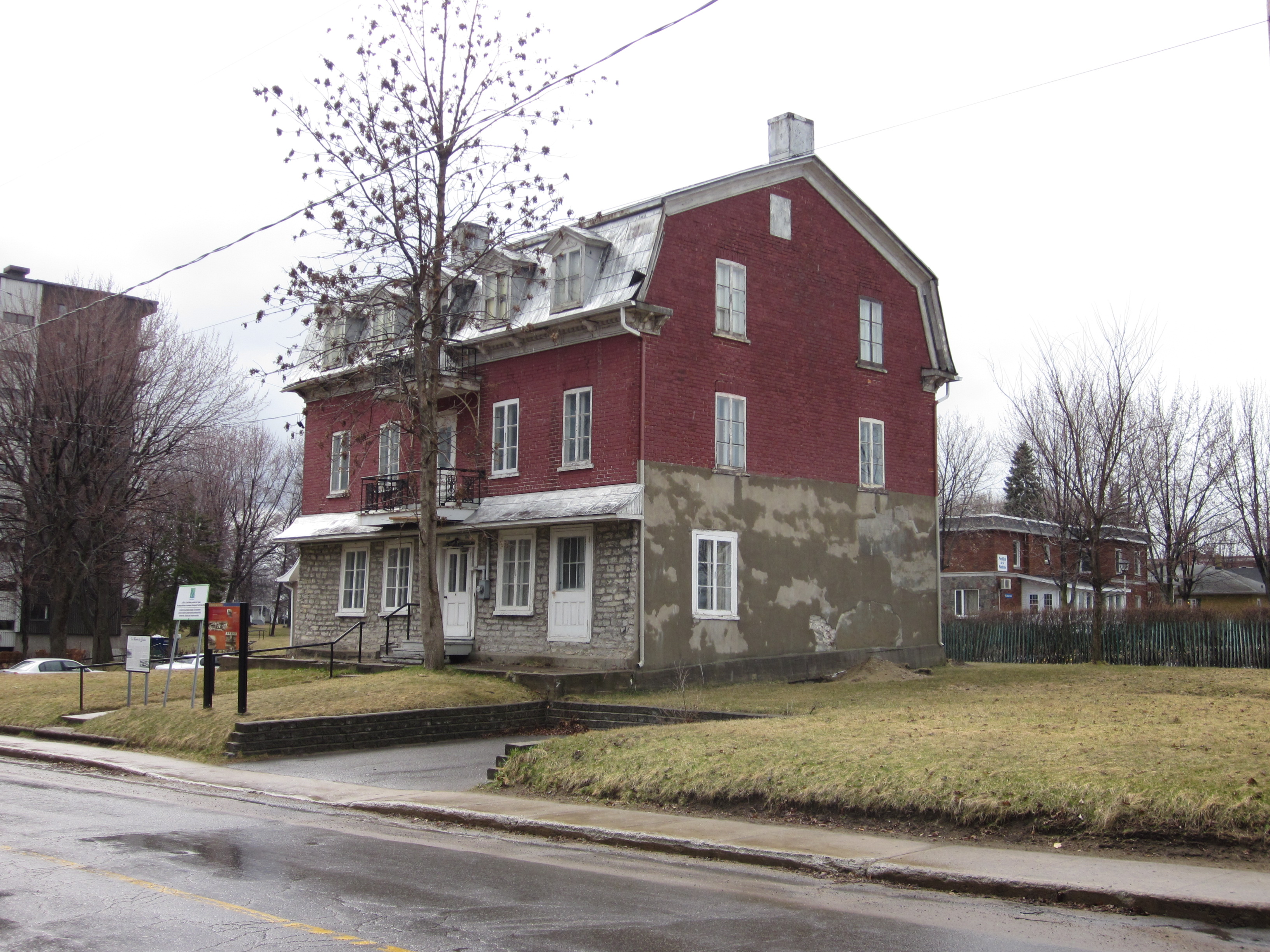 La manoir des Jésuites est une maison de Trois-Rivières construite en 1742. Elle a été citée monument historique en 2000.